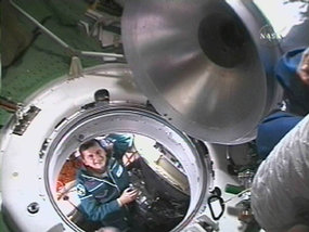 Simonyi in zero gravity